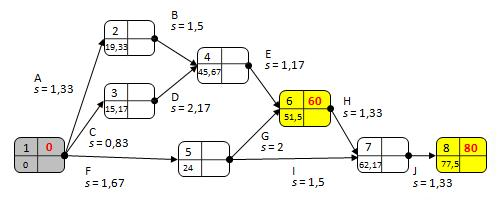 PERT-sivun kuvitusta, verkko 4.